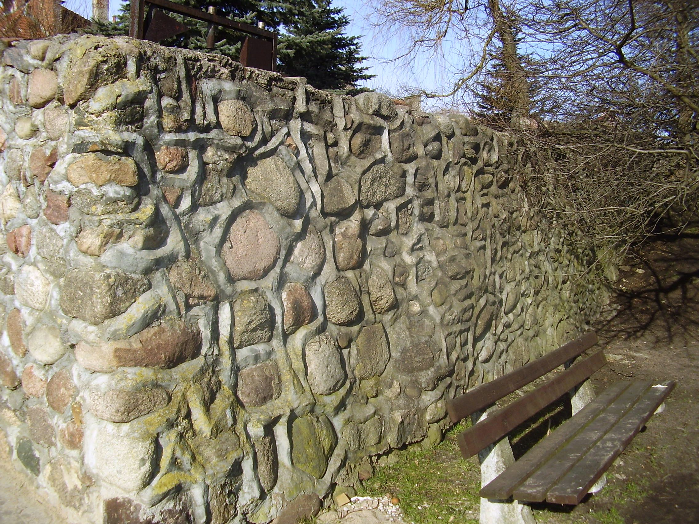 Fragment murów obronnych